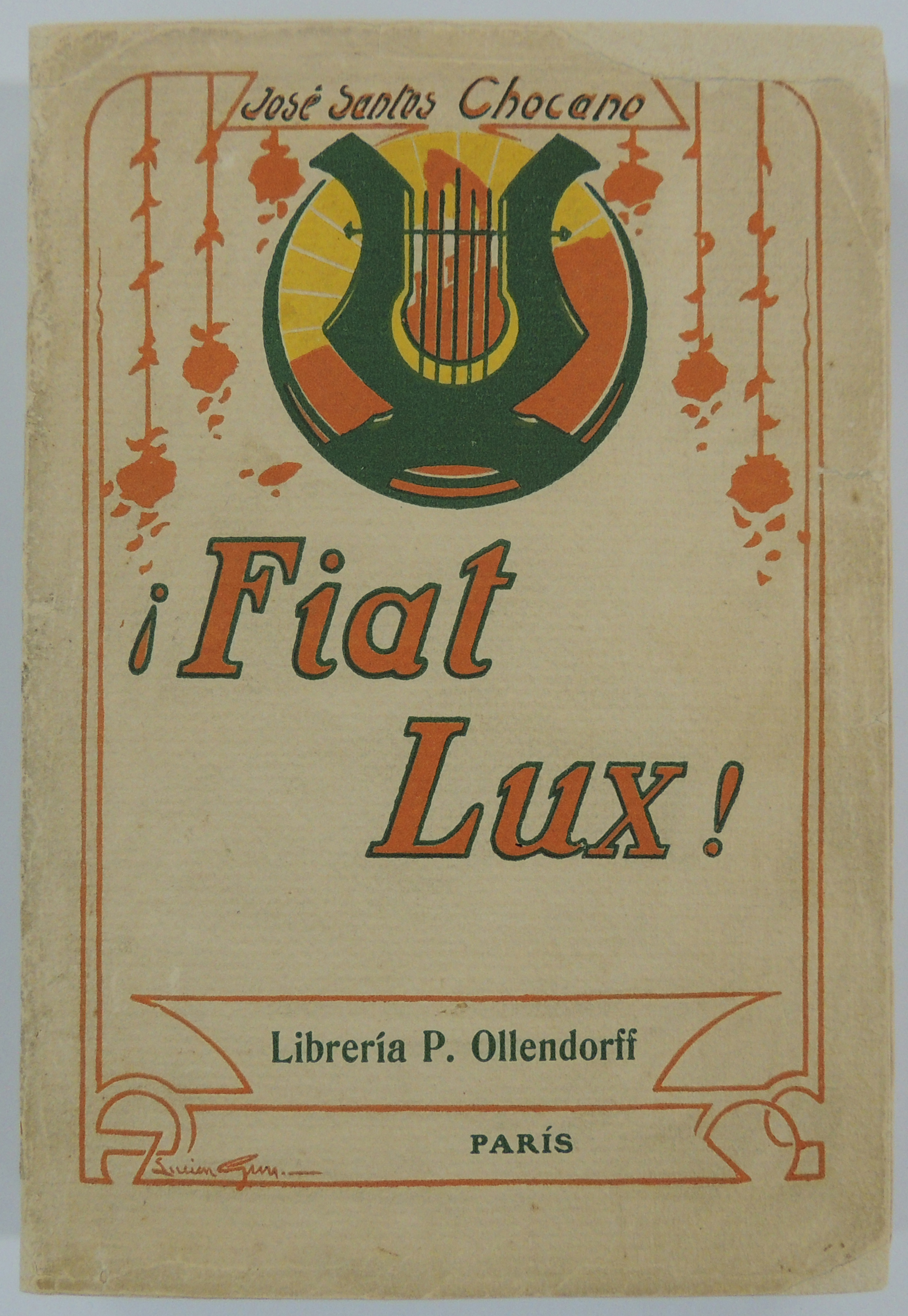 ¡Fiat lux! (1908)